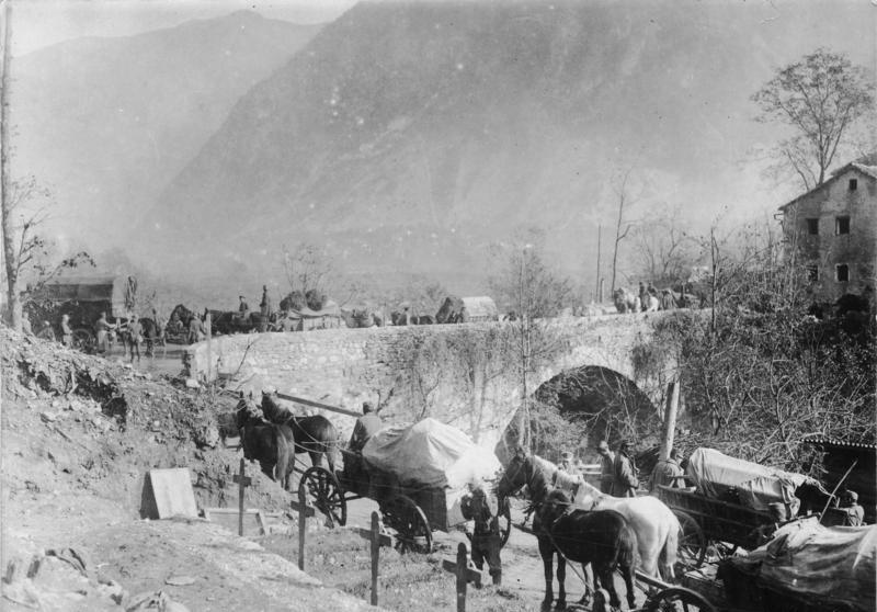 Die siegreiche Isonzo-Offensive. Vorgehender Train bei Santa Lucia. Oktober 1917